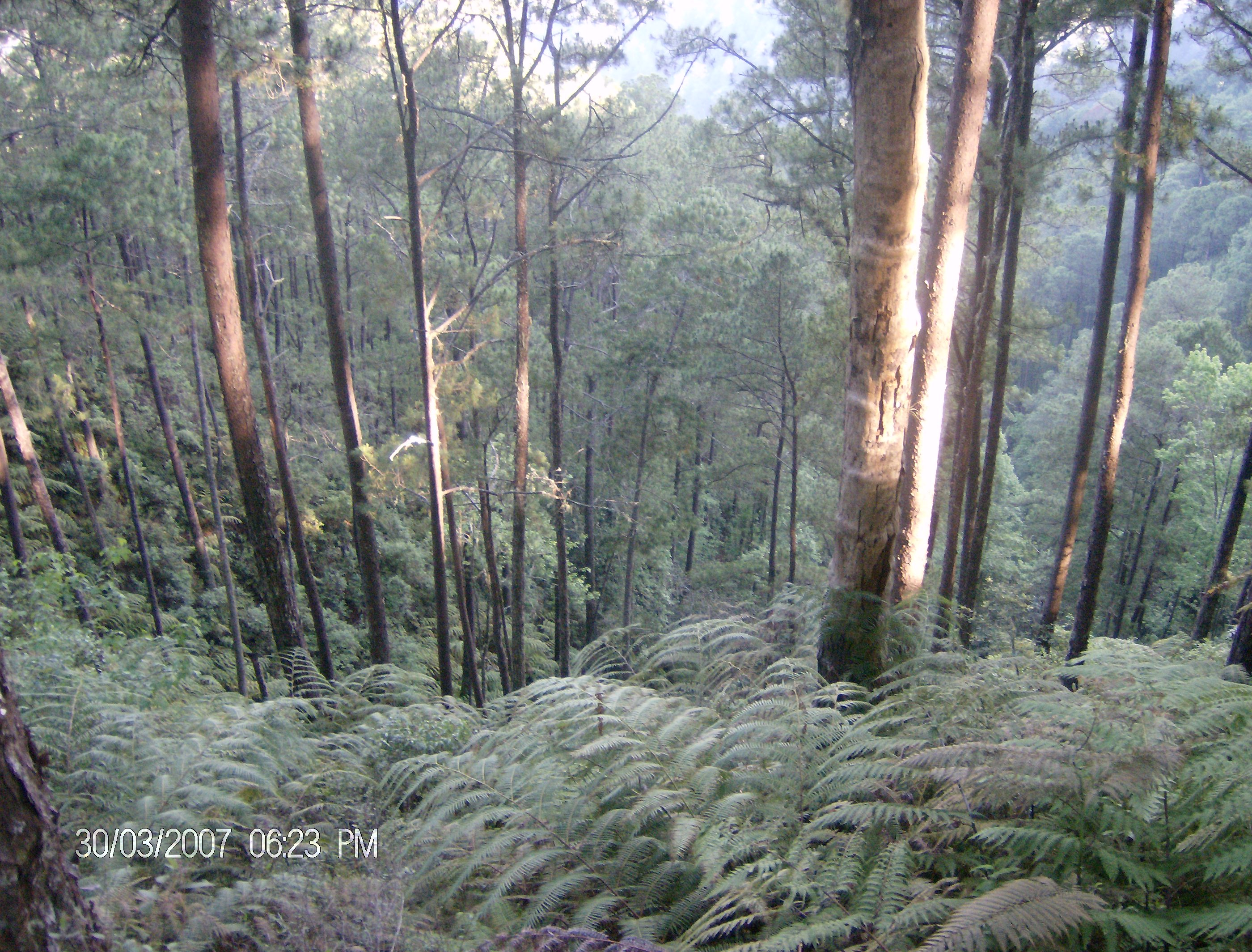 vista de vegetacion en el parque nacional cusuco, Honduras